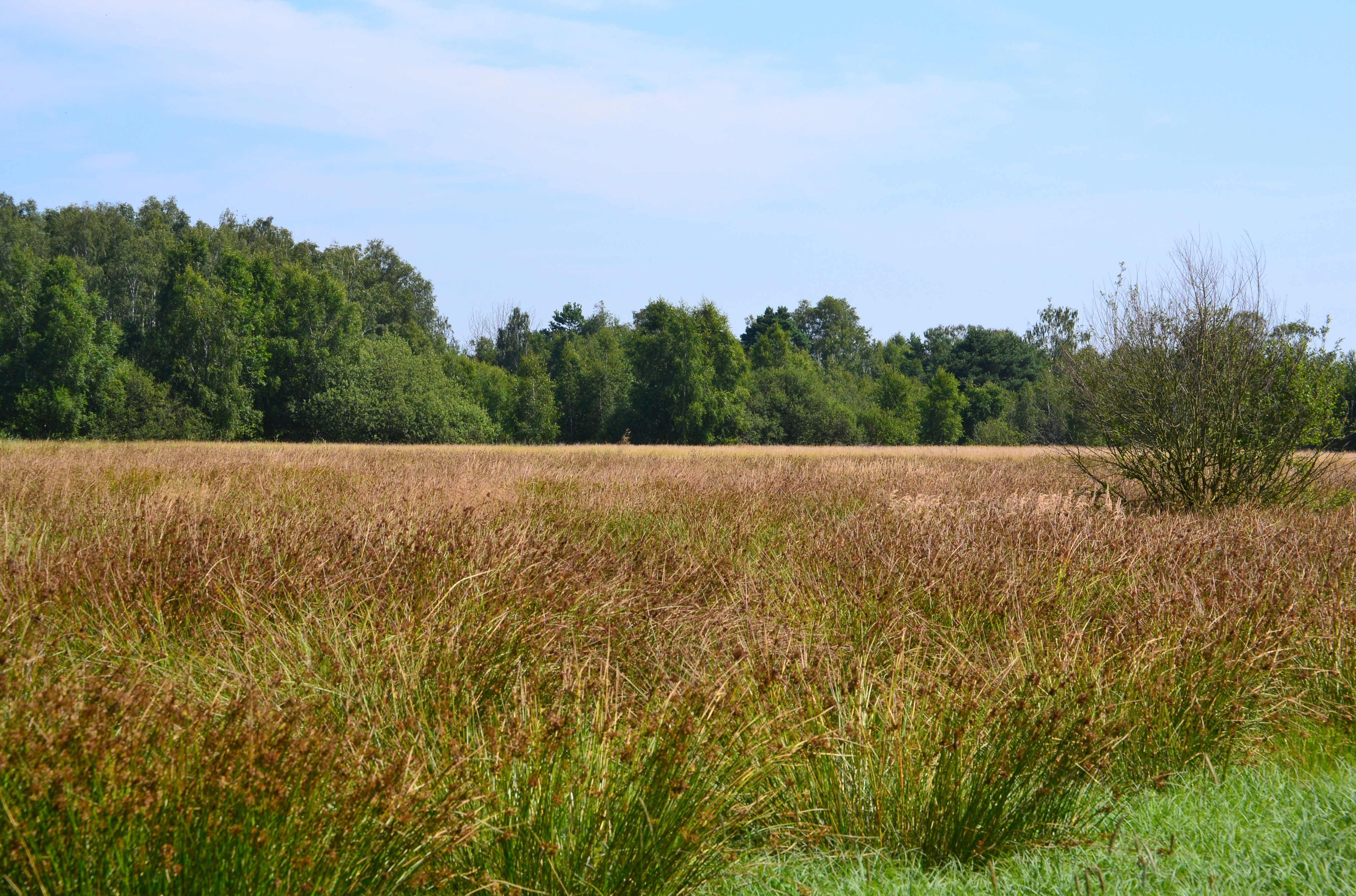 Blick in das Naturschutzgebiet Buttermoor/Butterbargsmoor